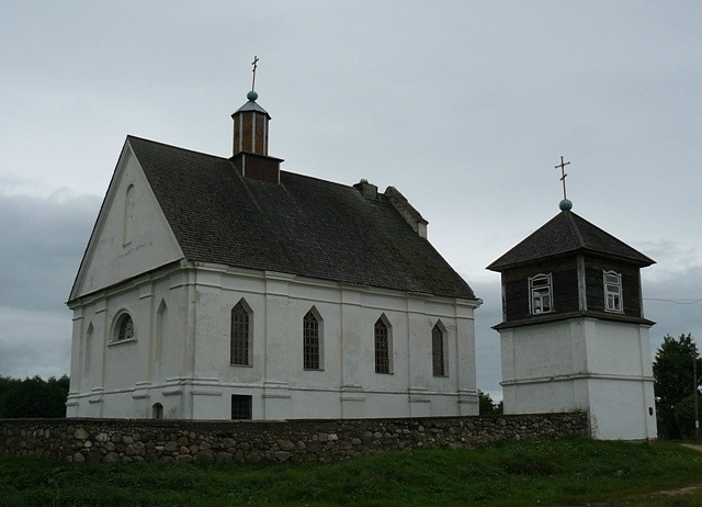 Успенская церковь, Плебань, Молодечненский район, Минская область. Фото путешествия по Беларуси.